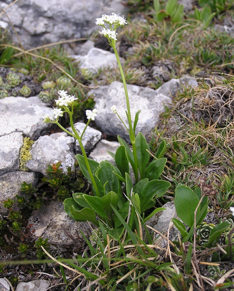 Valeriana saxatilis auf dem Krippenstein (Dachsteinmassif, Österreich).